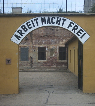 Zelfgemaakt in juli 2005. Gebruiker:NielsB